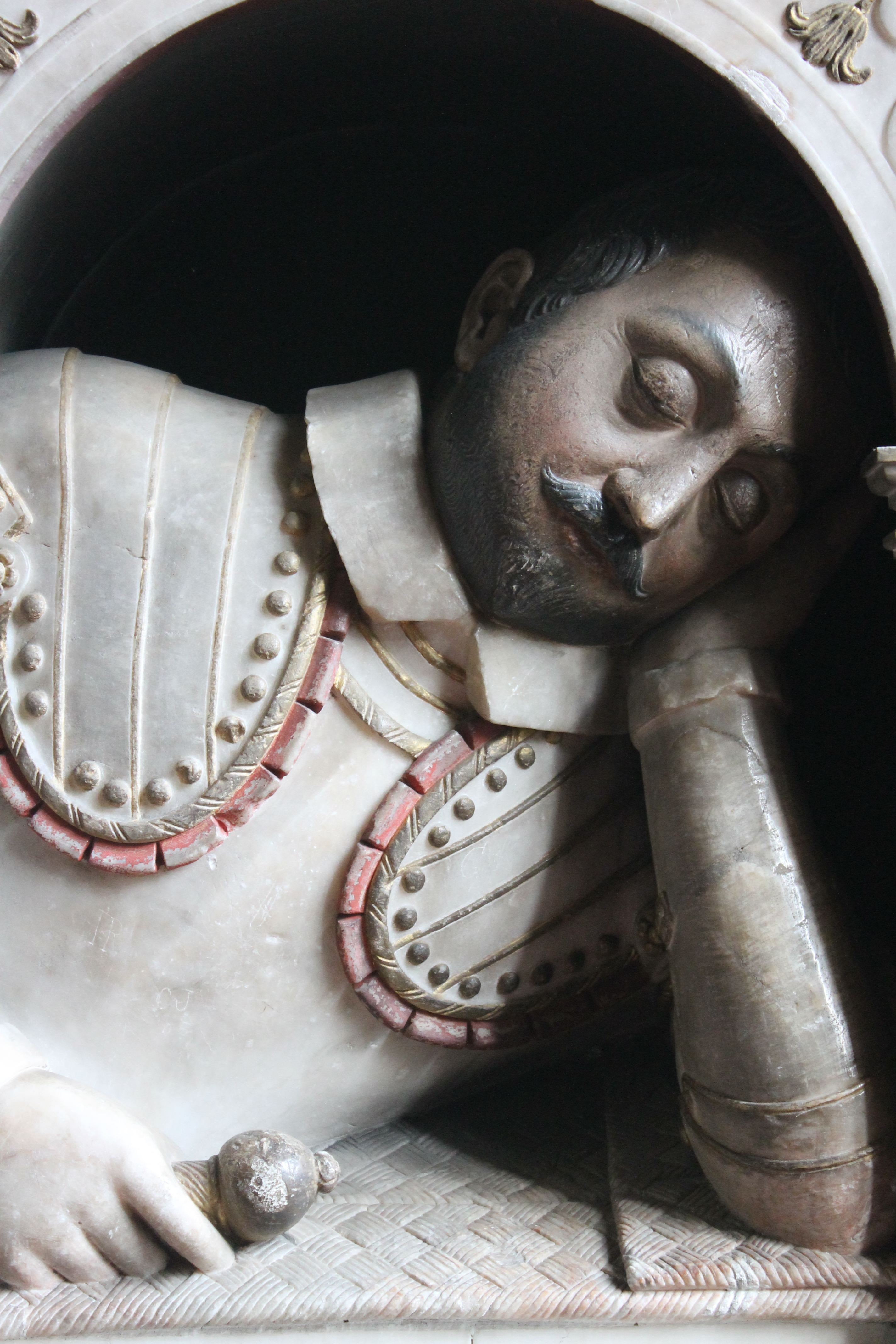 Uchelwr Cymreig a milwr ym myddin Harri VIII oedd Sion Trefor (hefyd John Trevor) a fu farw ym Mehefin 1589. Mae Sion Trefor fwyaf nodedig, efallai, am godi Trefalun (neu Drefalyn) yn 1576, ym mhentref Yr Orsedd (Rossett) yn ardal Maelor, plasty enfawr ac am fod yn dad i rai o uchelwyr mwyaf pwerus gogledd-ddwyrain Cymru.